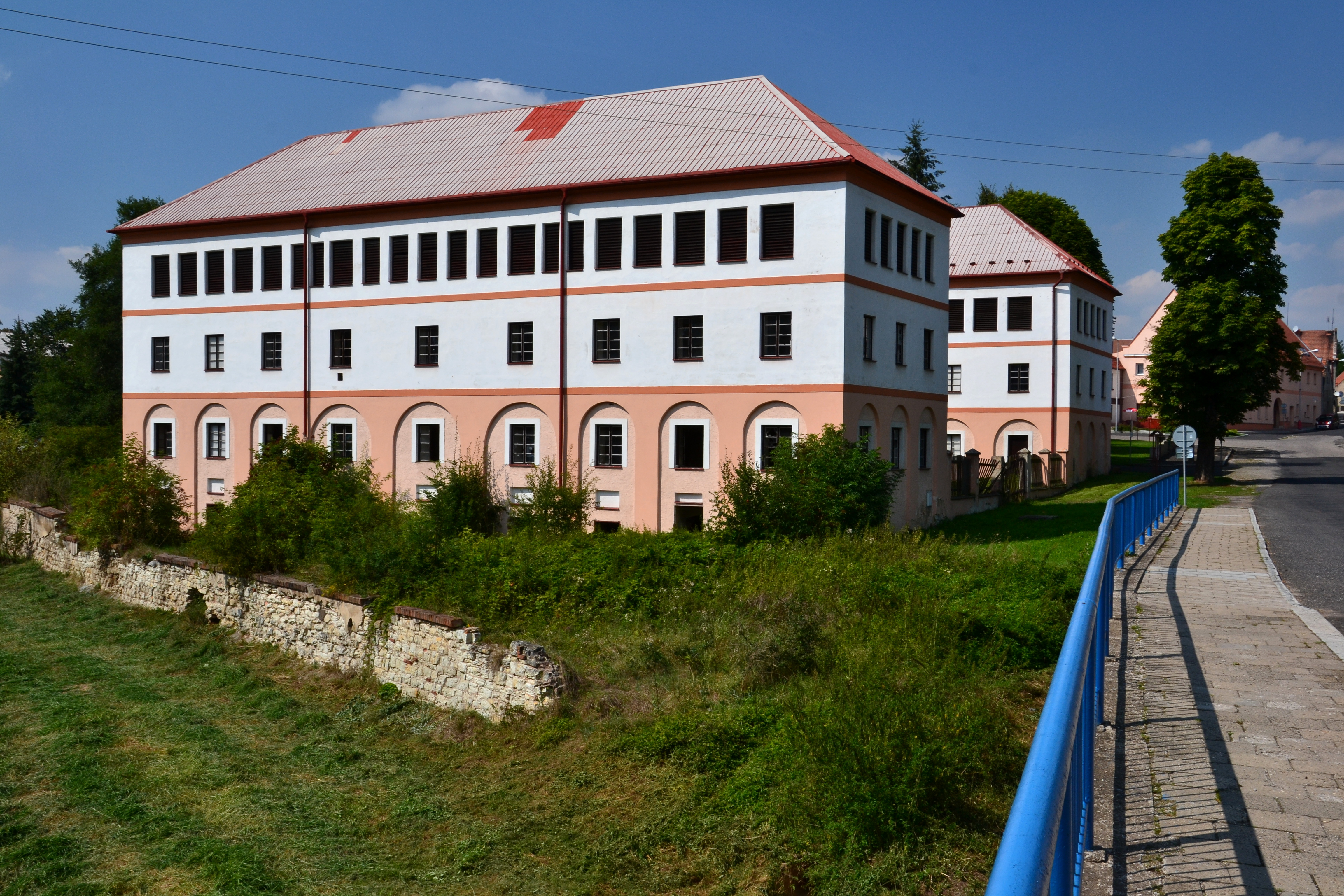 Sladovna (Měcholupy), proti zámku 17, Měcholupy